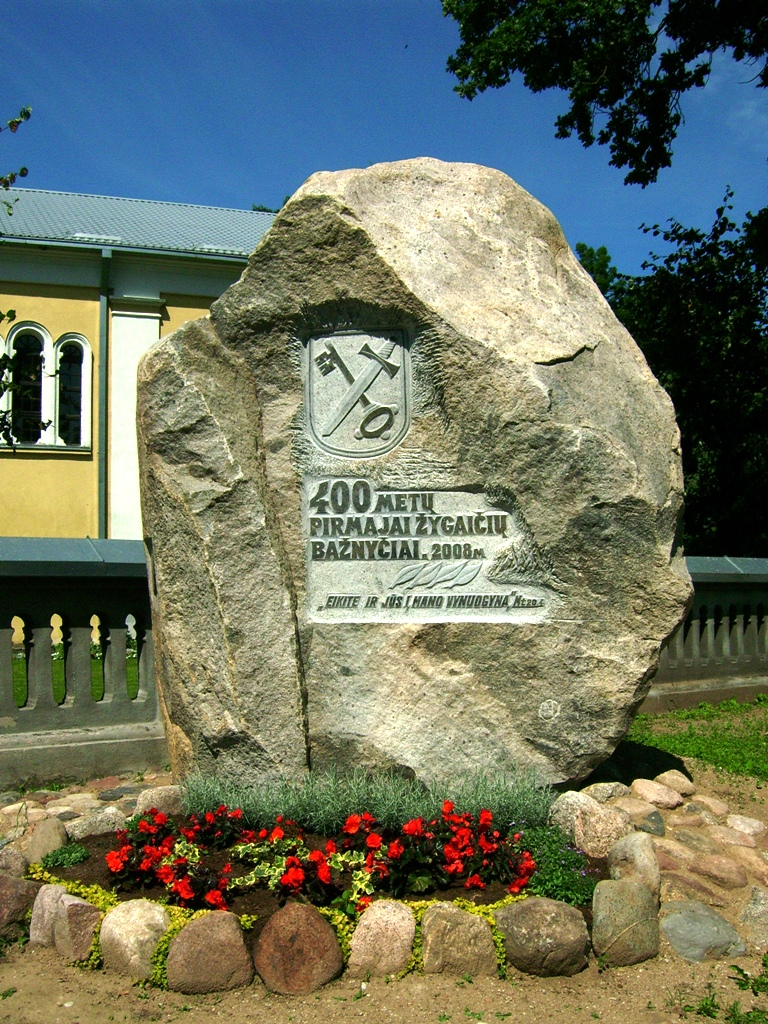 Akmuo pirmosios Žygaičių bažnyčios pastatymo atminimui